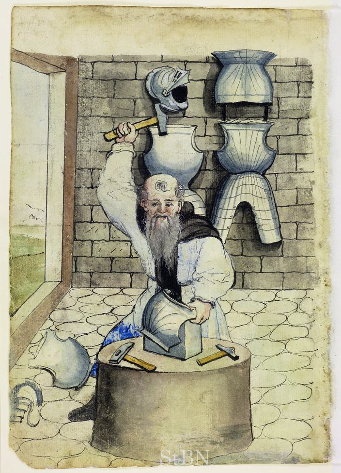 Conz (Kunz) falck (Falk) , platner (Plattner; Harnischmacher) Transkription und weitere Informationen